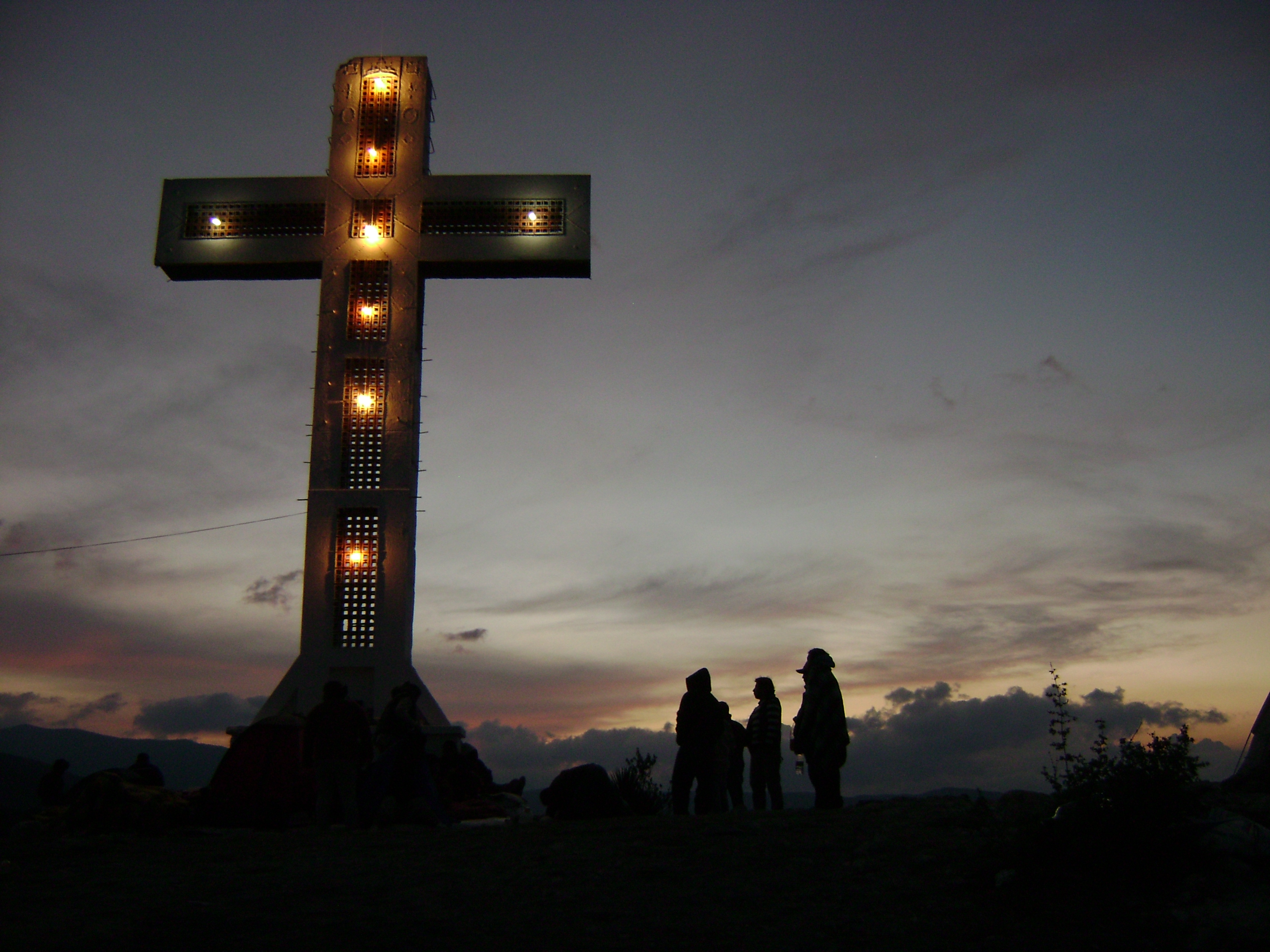 La Cruz del cerro colorado de Tehuacán Puebla México